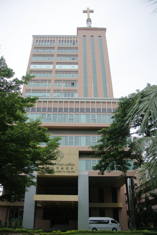 タイ国キリスト教団ビル（バンコク都ラーチャテーウィー区ペッチャブリー通りパヤータイ通り328）2013年撮影画像